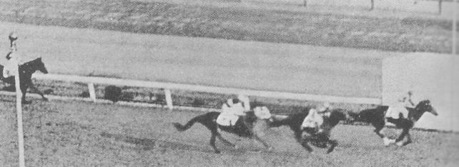 第6回東京優駿直線